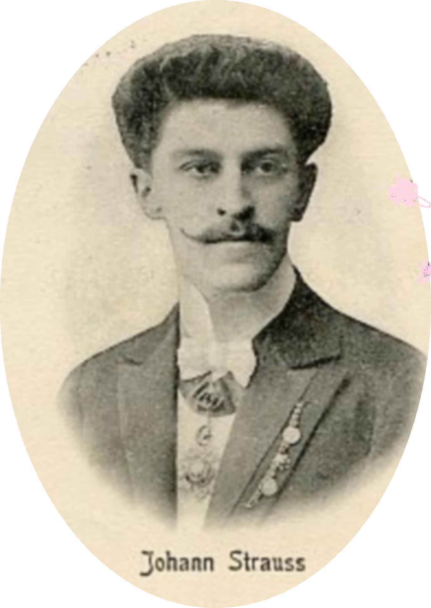 Johann Eduard Strauss Komponist (1866-1939)